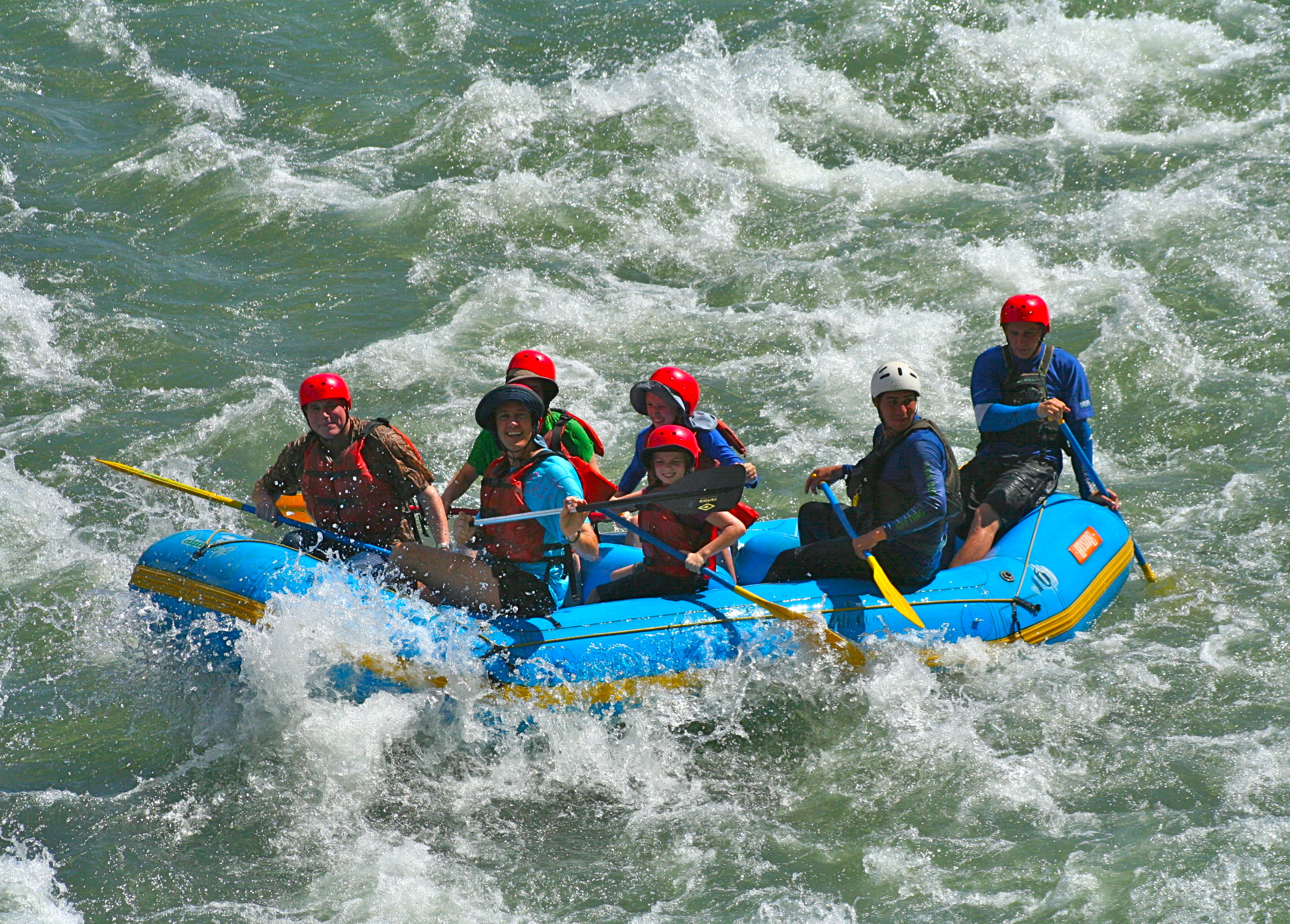 Rafting en el río Sarapiquí, Costa Rica.